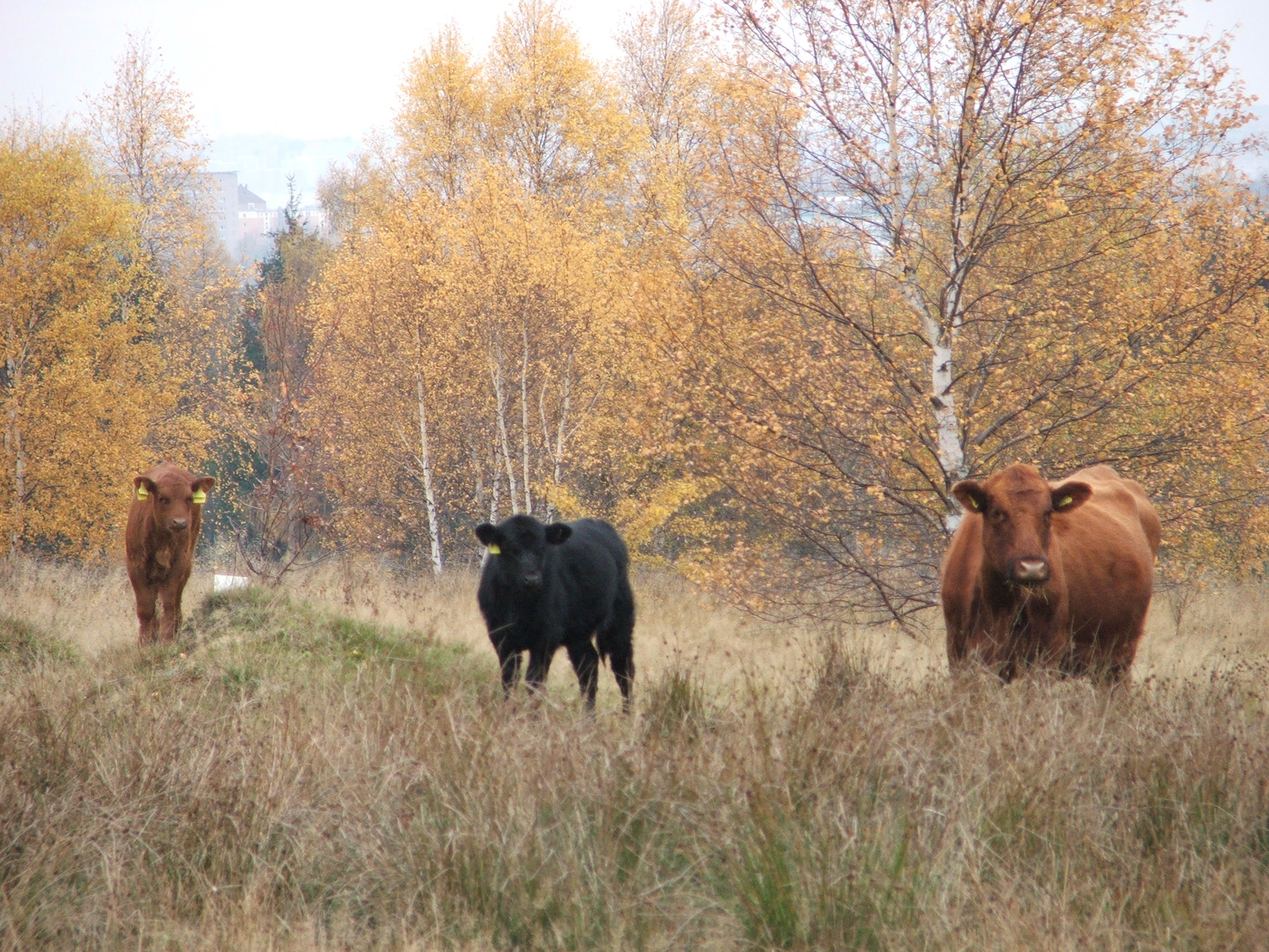 Das Bild zeigt eine Deutsch-Angus-Mutterkuh und zwei Kälber in der Extensivbeweidung (Naturschutzprojekt des Natur-Hof Chemnitz e.V. in Chemnitz, Sachsen).